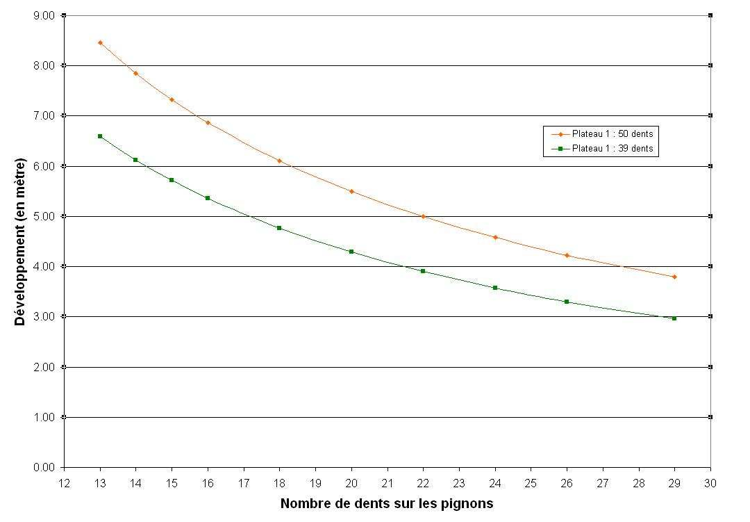 Développement d'un vélo de type course, roue arrière de 700 mm : Plateaux : 50/39 Pignons : 13,14,15,16,18,20,22,24,26,29 Copie d'écran d'un graphique réalisé sur Excel.